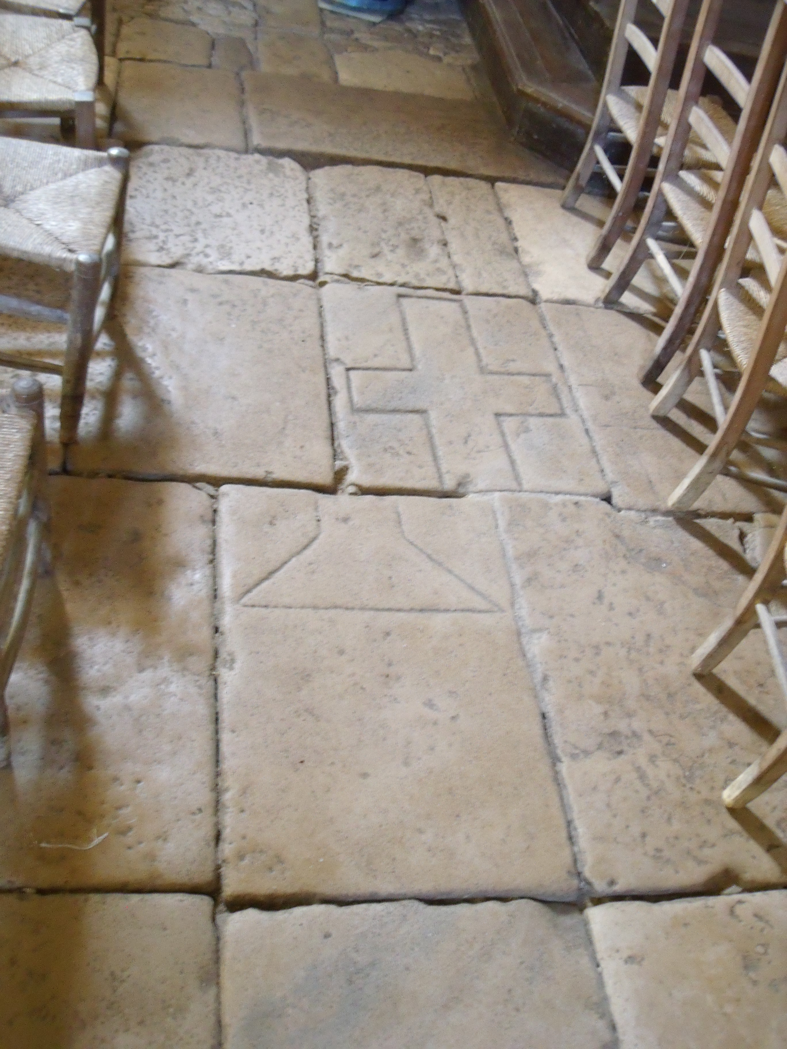 Sol de l'église Saint Martin - Ajat, Dordogne, France